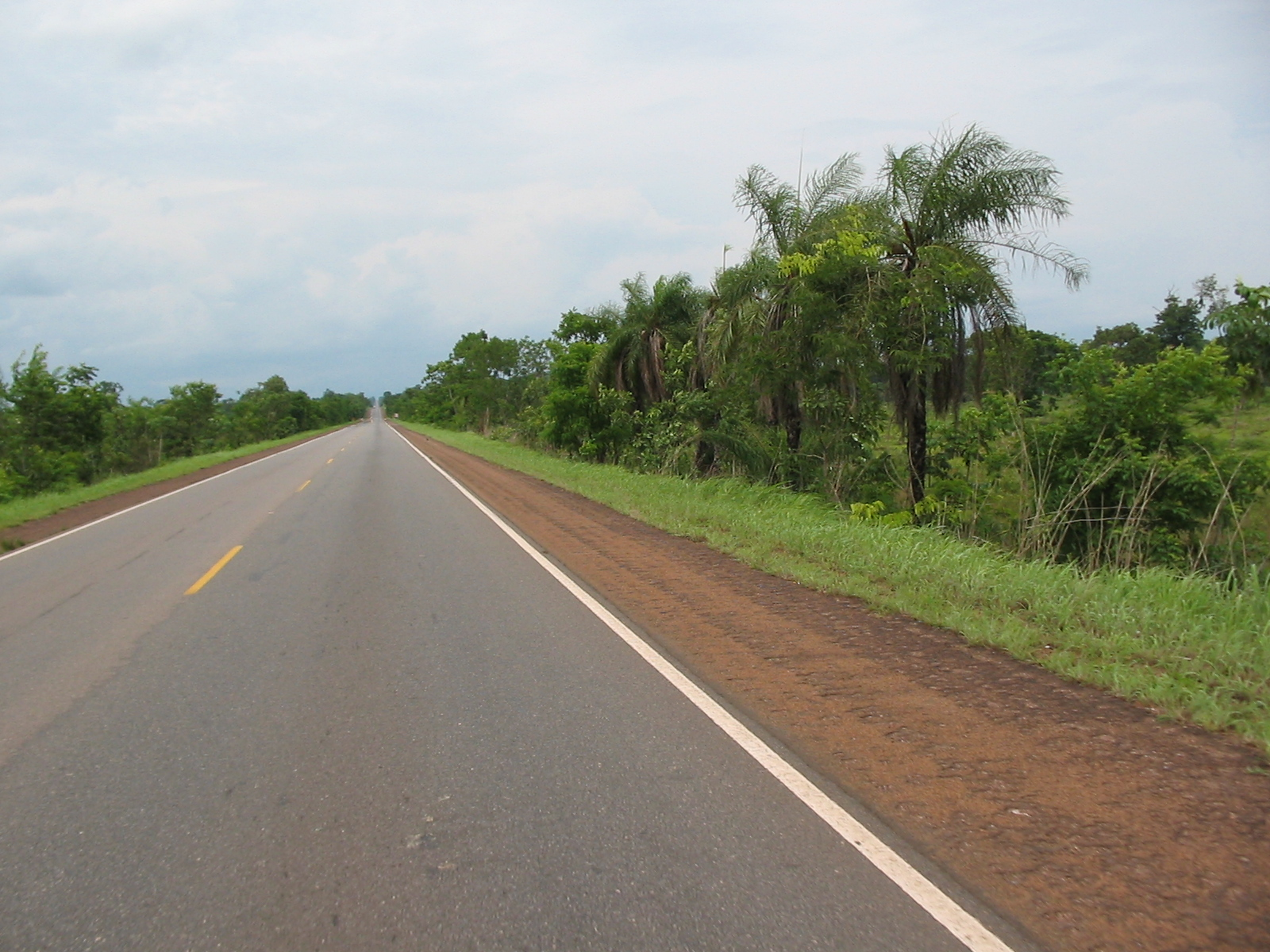 Rodovia BR 153 Trecho Tocantins Brasil, Samuel Peixoto.